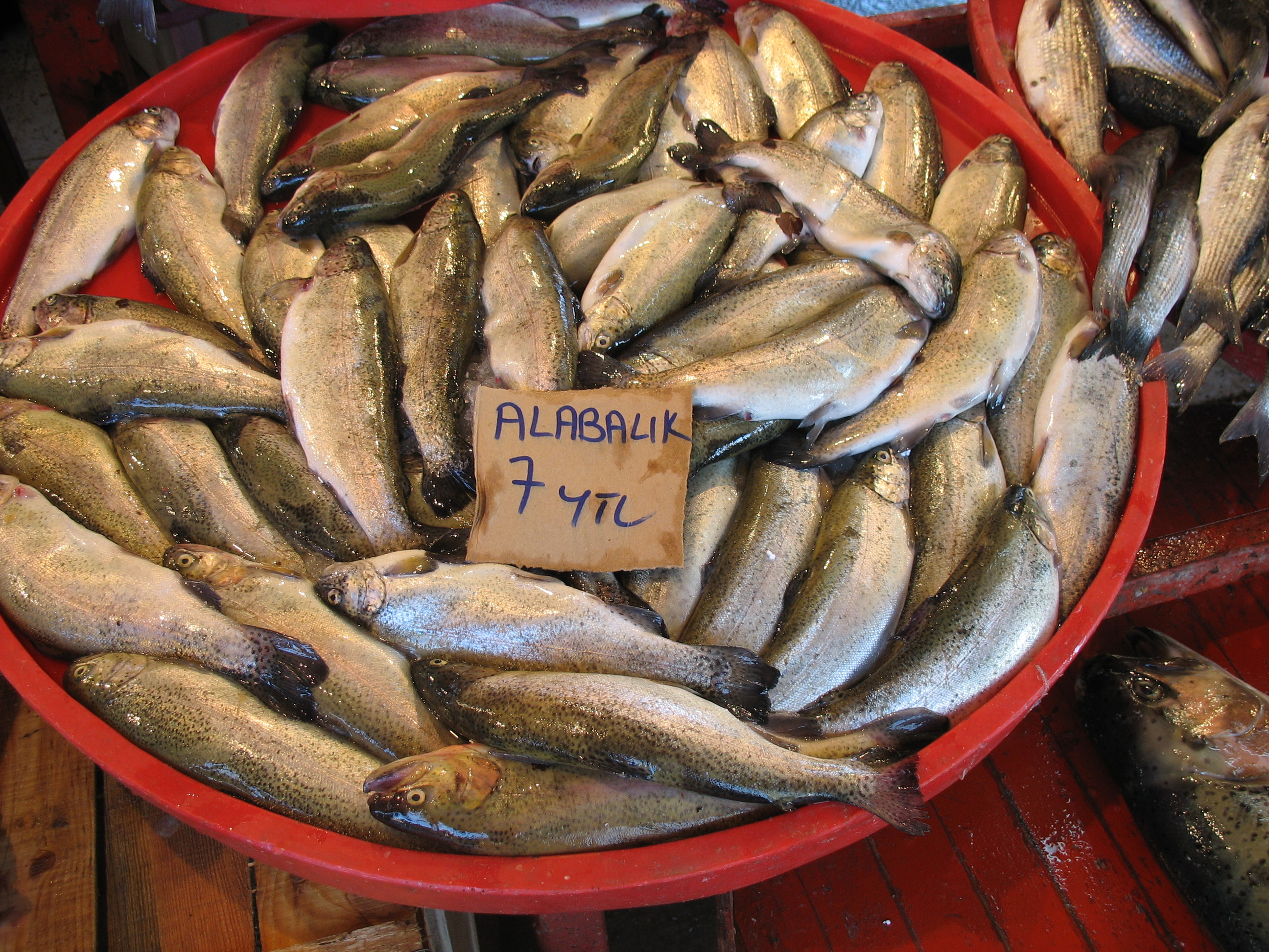 Pazarda satılan alabalık